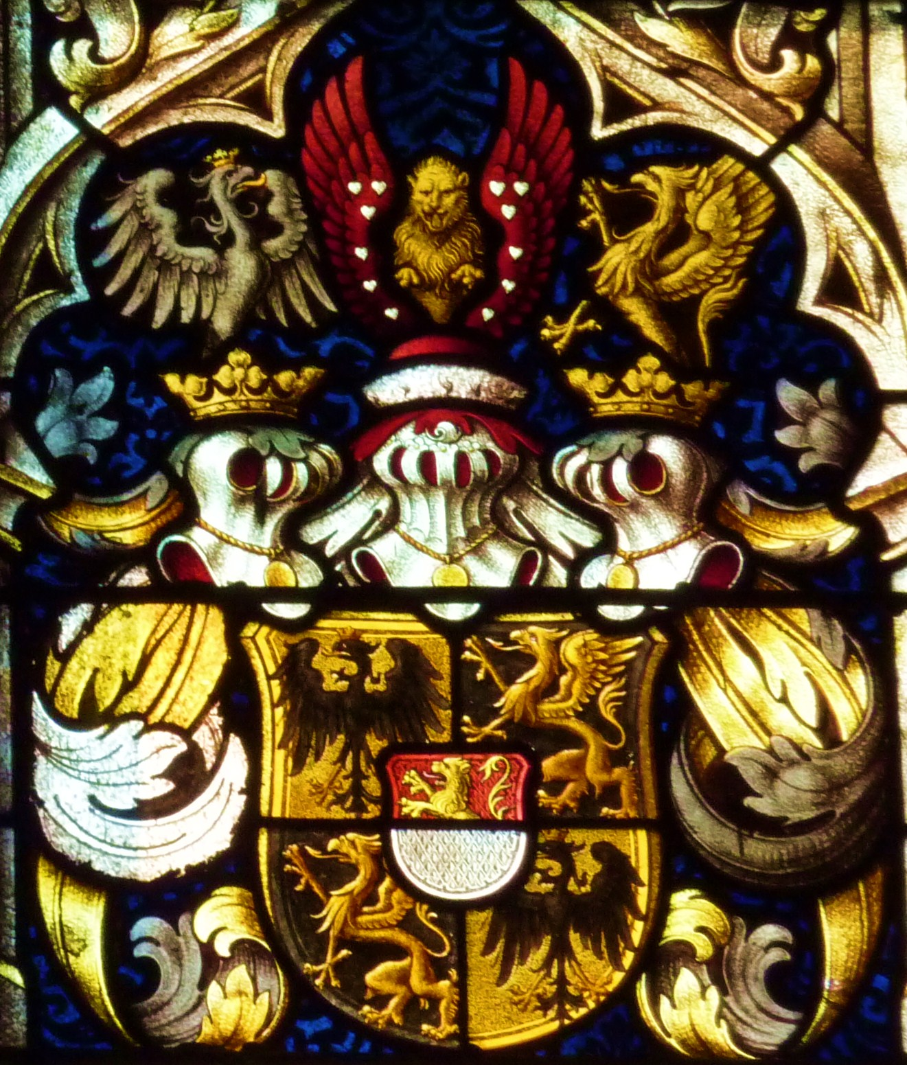 Bleiglasfenster in der katholischen Pfarrkirche St.Philippus und Jakobus in Kempenich, Darstellung: Detail mit Wappen der Grafen von und zu Eltz-Kempenich (mit dem goldenen Löwen) und Inschrift (links), die lautet „Dem Andenken des Stifters unserer Frühmesse, des Grafen Anselm Franz Casimir Eltz-Kempenich (1771) gewidmet aus Beiträgen der erlauchten Familie 1905“, unten Signatur: Dr. H. Oidtmann Linnich“